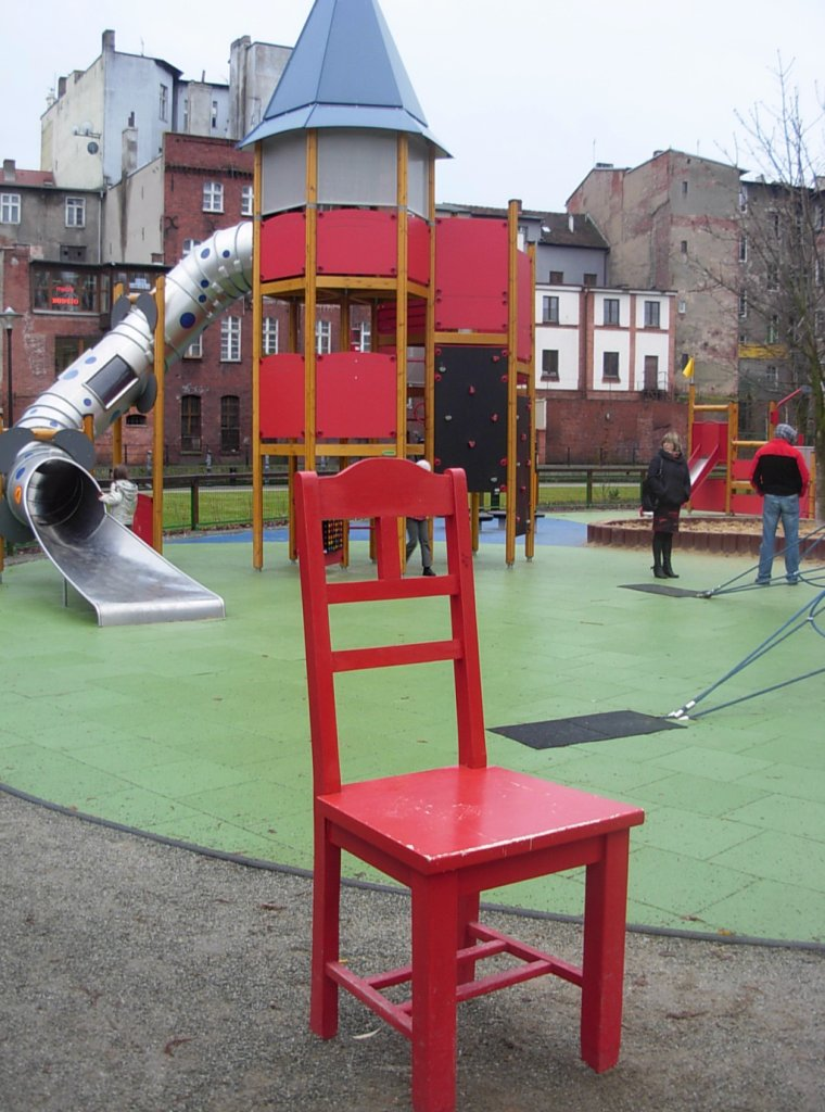 Magiczne krzesło (nawiązujące do kręconego m.in. na Wyspie Młyńskiej w Bydgoszczy filmu A. Maleszki "Magiczne drzewo") na placu zabaw na Wyspie Młyńskiej w Bydgoszczy